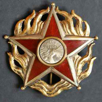 Орден 25 февраля (ЧССР)